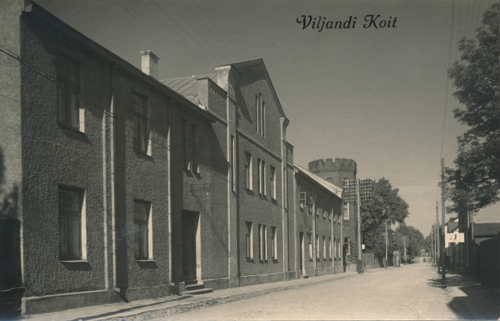 Koidu seltsi maja, Jakobsoni tänav, Viljandi, 1932